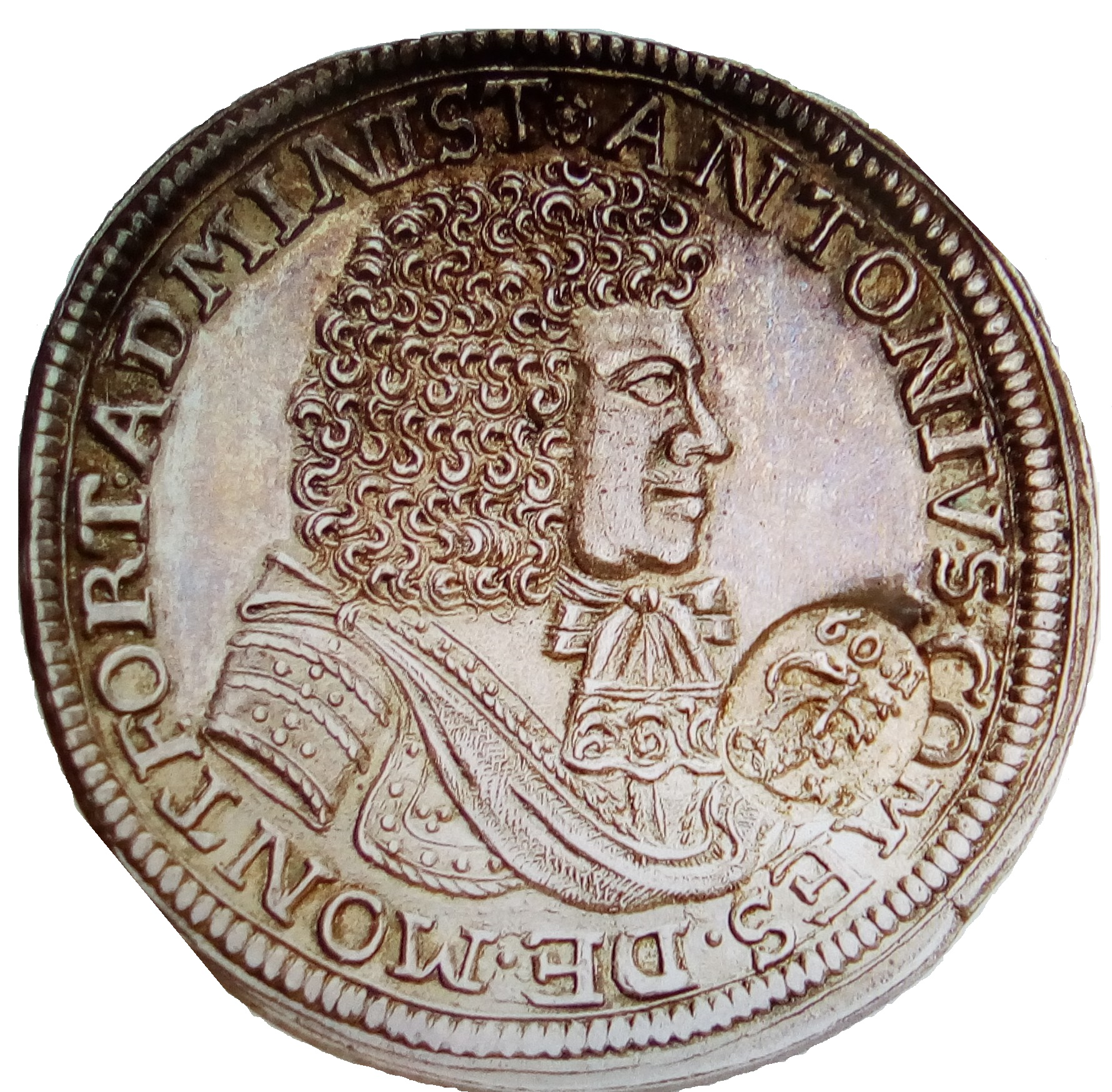 Gulden zu 60 Kreuzer von Anton II. von Montfort 1690 im Münzhof Langenargen geprägt Avers: Anton II. (Portrait n. rechts); Gegenstempel des Fränkischen Kreises (60) ADMINIST(rator) ANTONIVS COMES DE MONTFORT